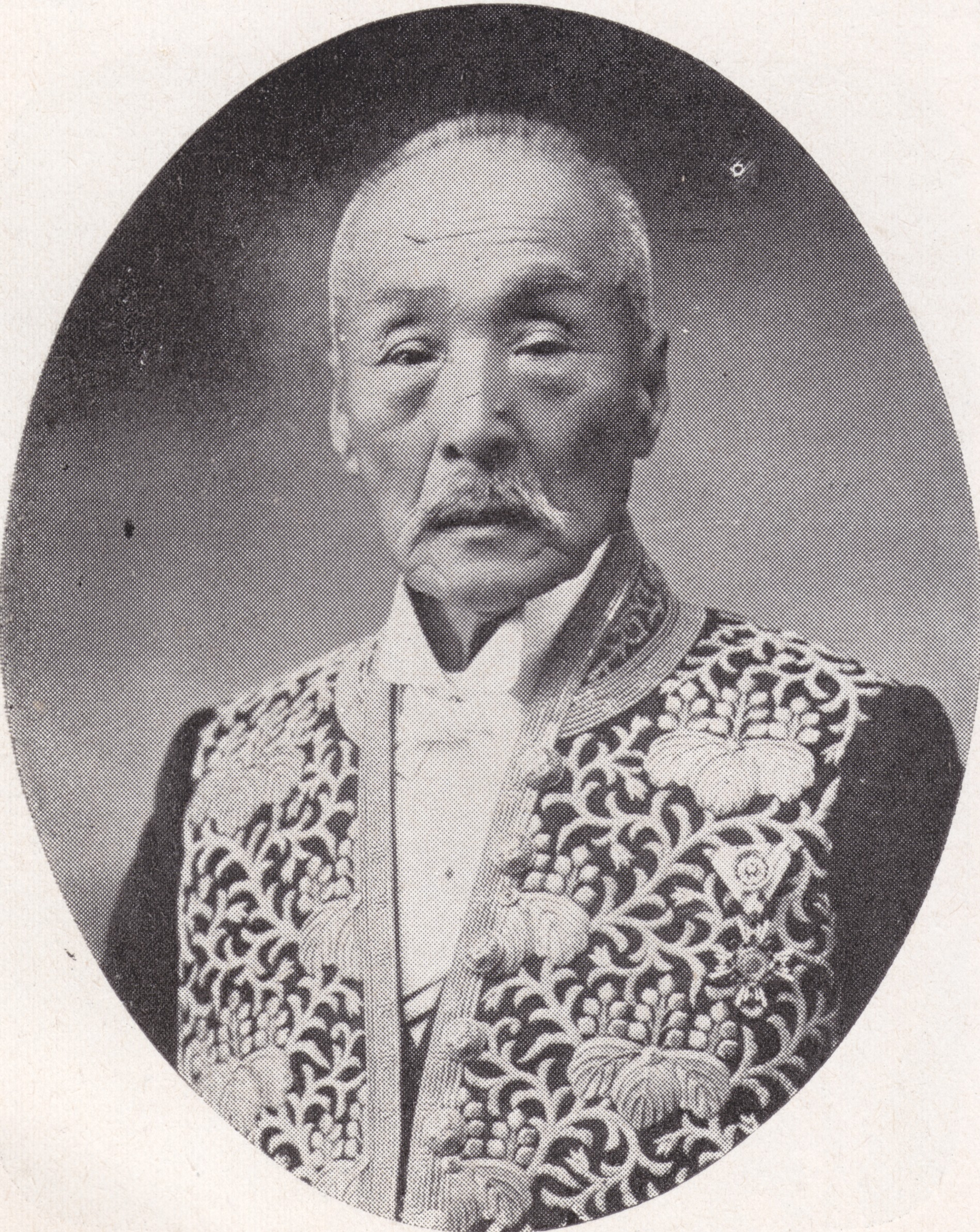 神宮大宮司・子爵三室戸和光